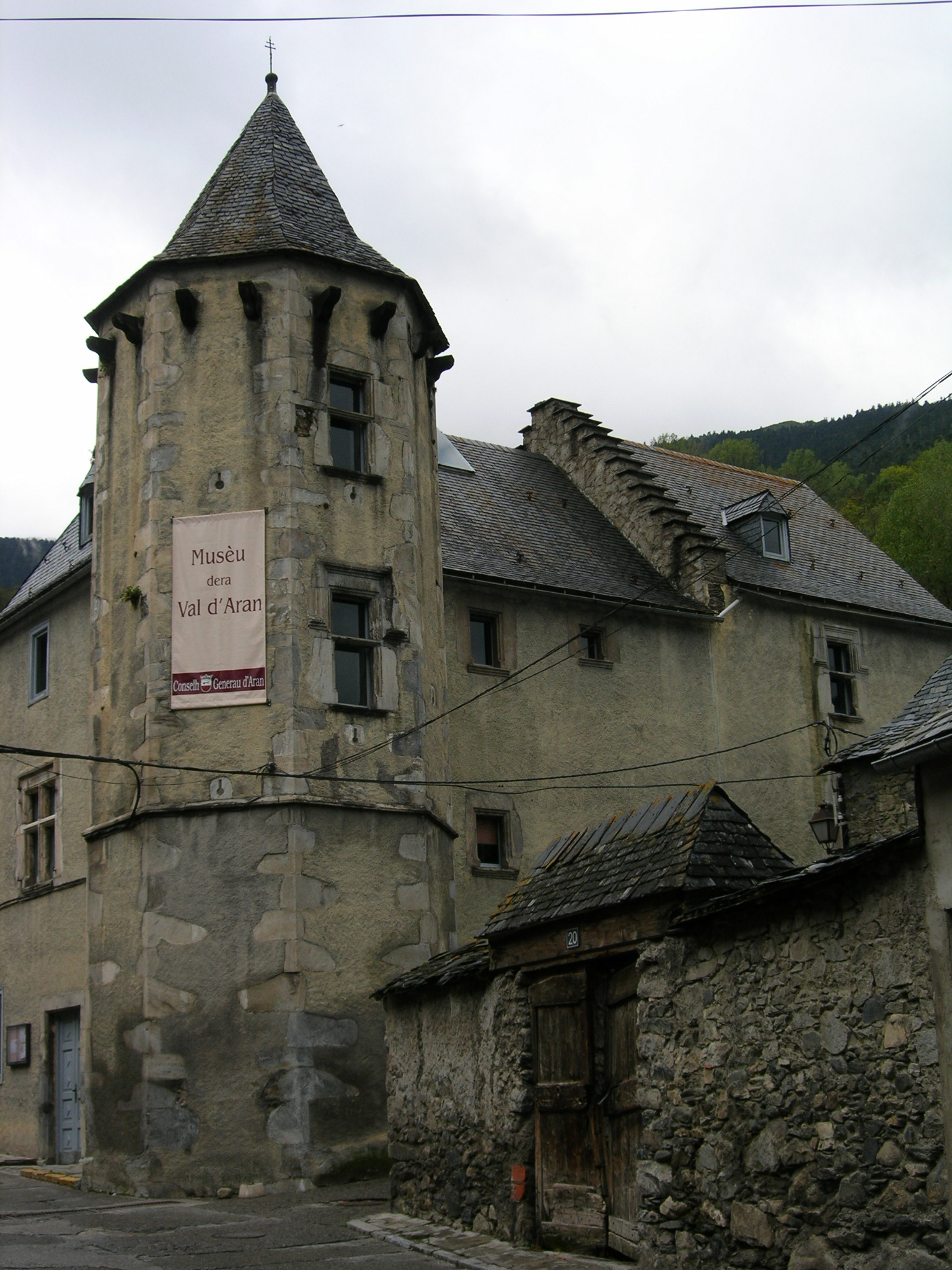 Tor deth Generau Martinhon (Vielha e Mijaran)